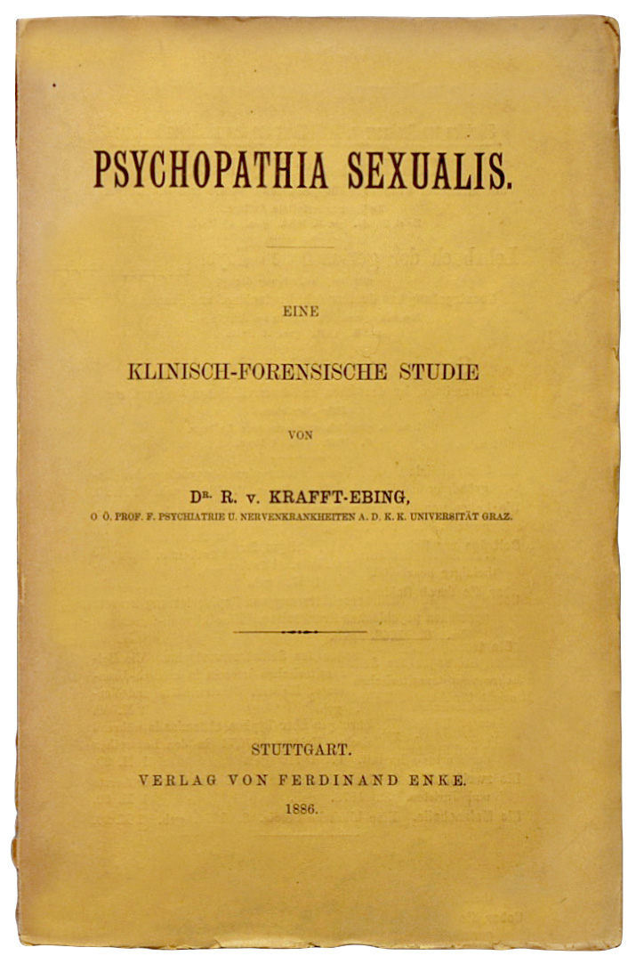 Psychopathia sexualis. Eine klinisch-forensische Studie. Original-Verlagsbroschur des Erstrucks 1886.